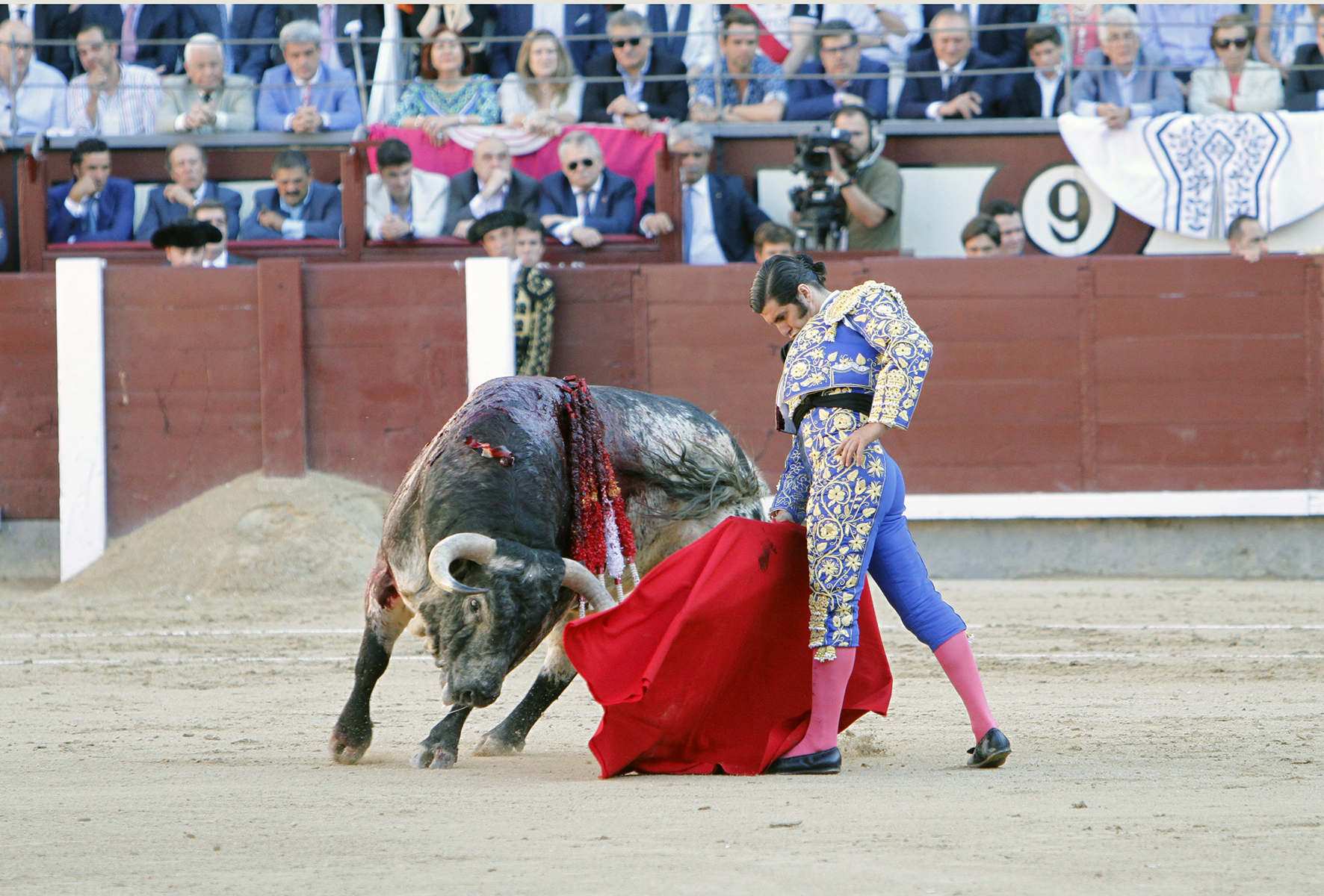 Toreo de muleta. Trinchera de José Antonio Morante de la Puebla, a un toro de Alcurrucén, el 27 de mayo de 2015, en Las Ventas, Madrid.